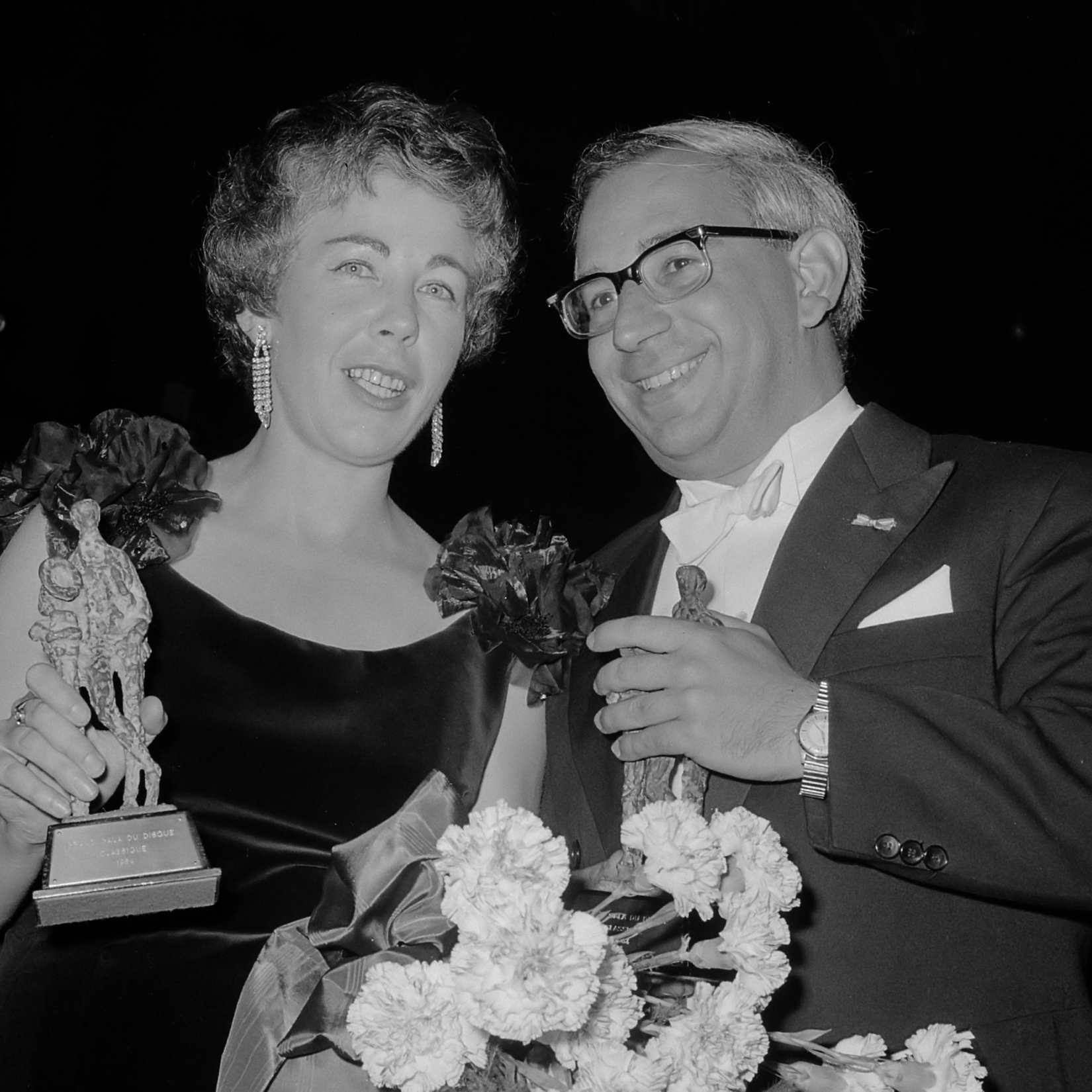 Edisons (klassiek) in Concertgebouw uitgereikt, de Nederlandse Edisonwinnaar mevrouw Marijke Smit Sibinga (clavecimbel) en Daniel Wayenberg (pianospel) 25 september 1964